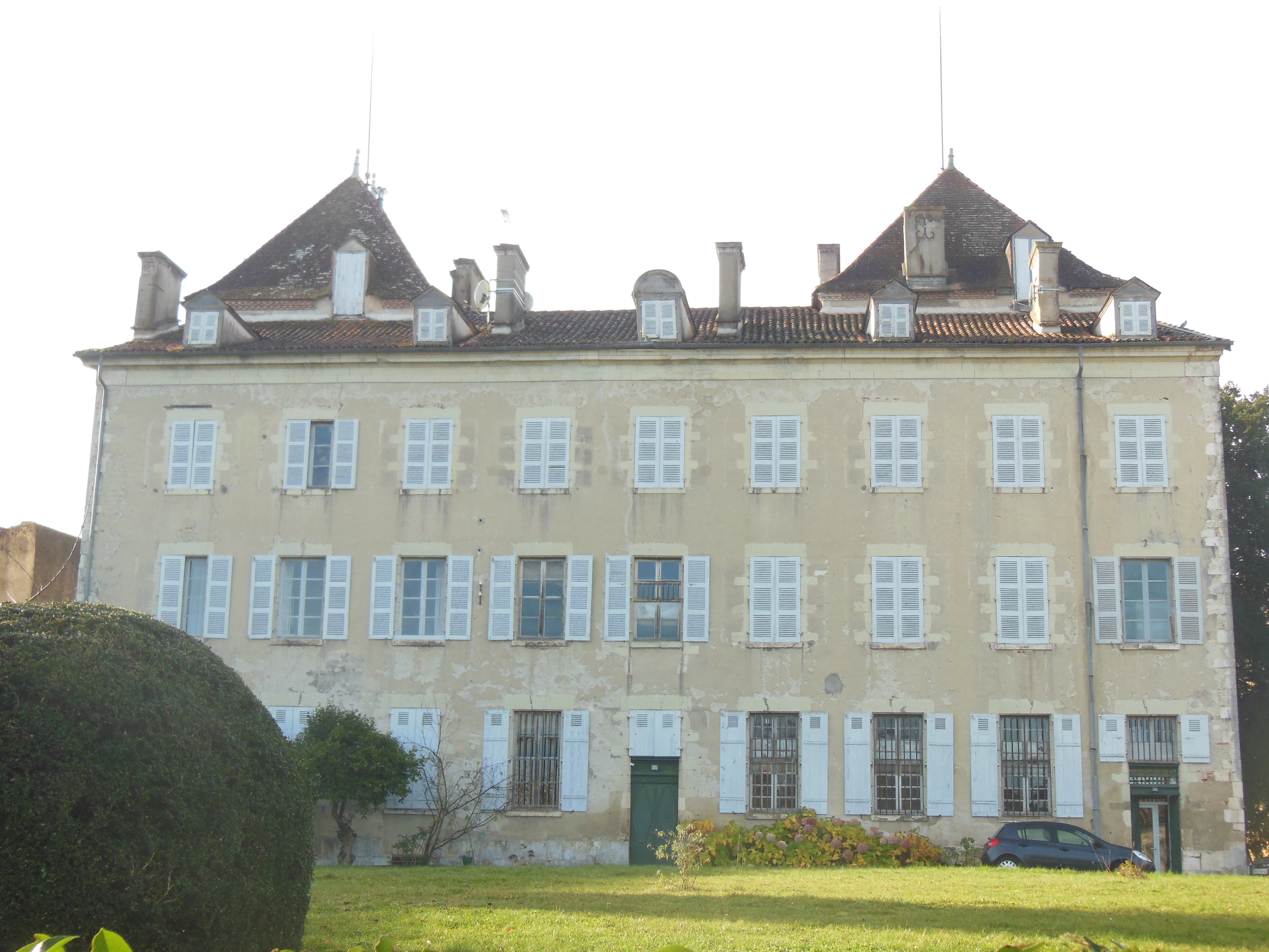 Château du Général Lamarque, façade côté jardin